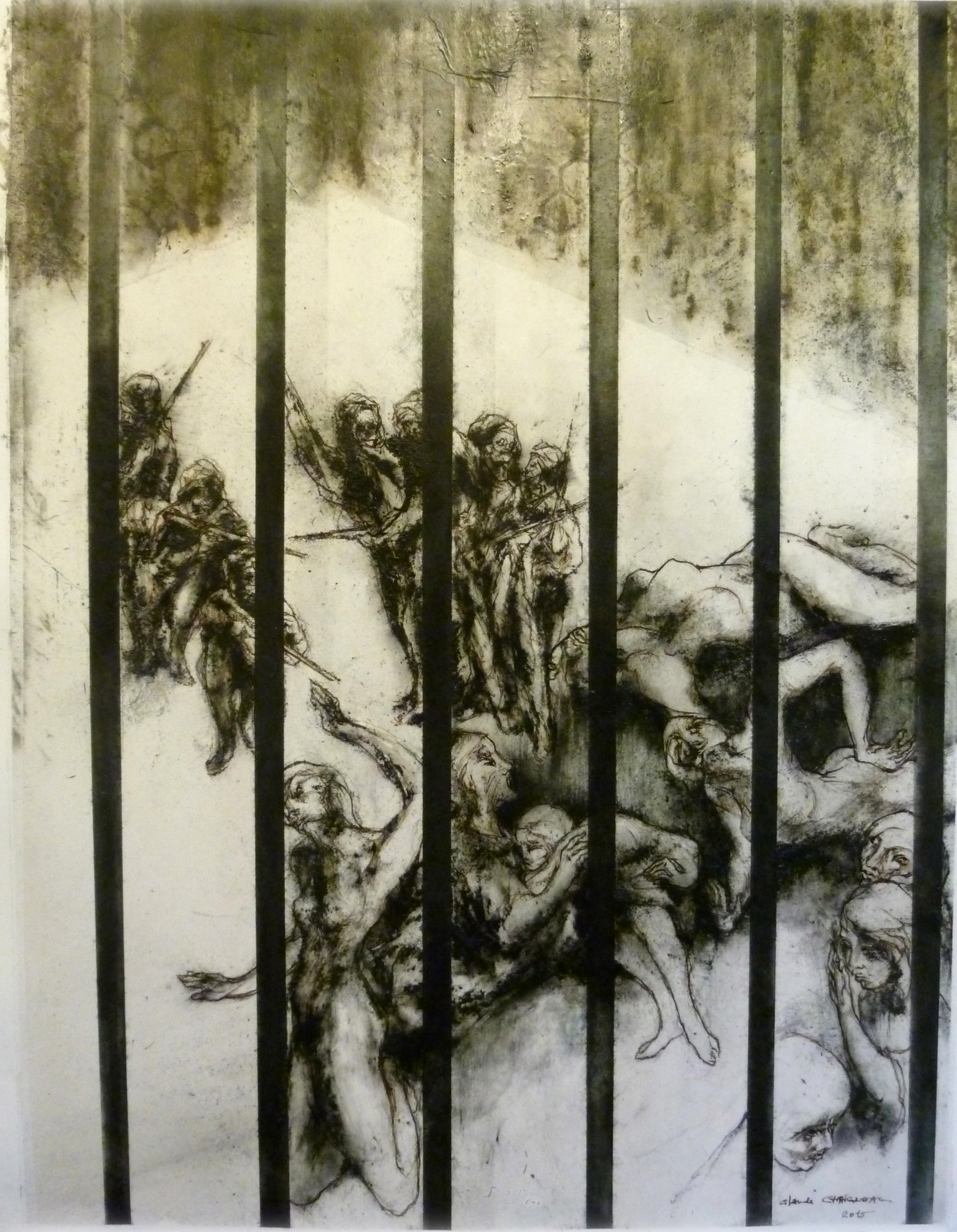 prisonniers derrière des barreaux